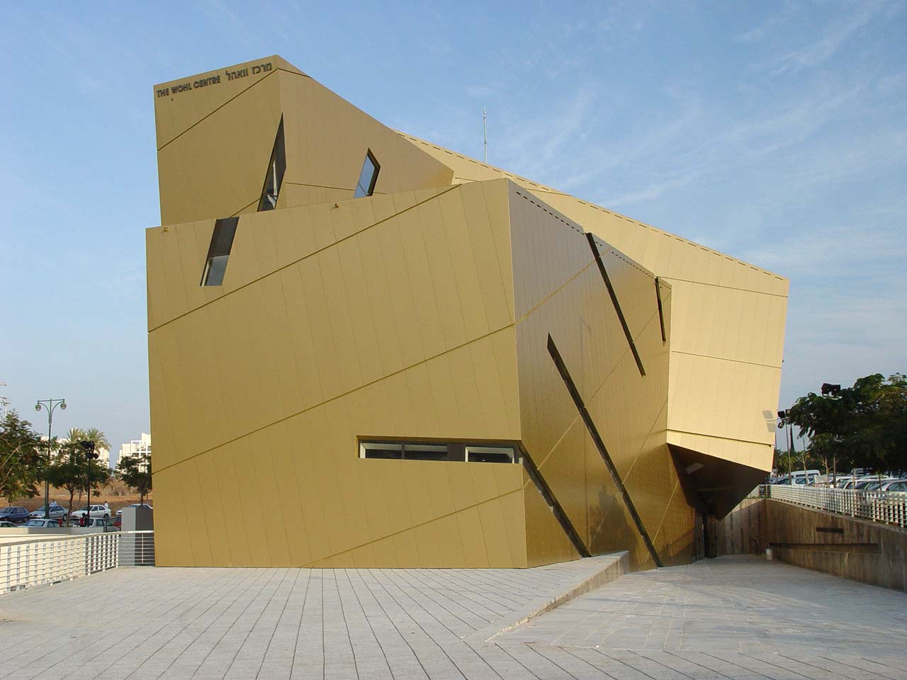 מבט מכיוון מערב - מרכז וואהל באונ' בר-אילן